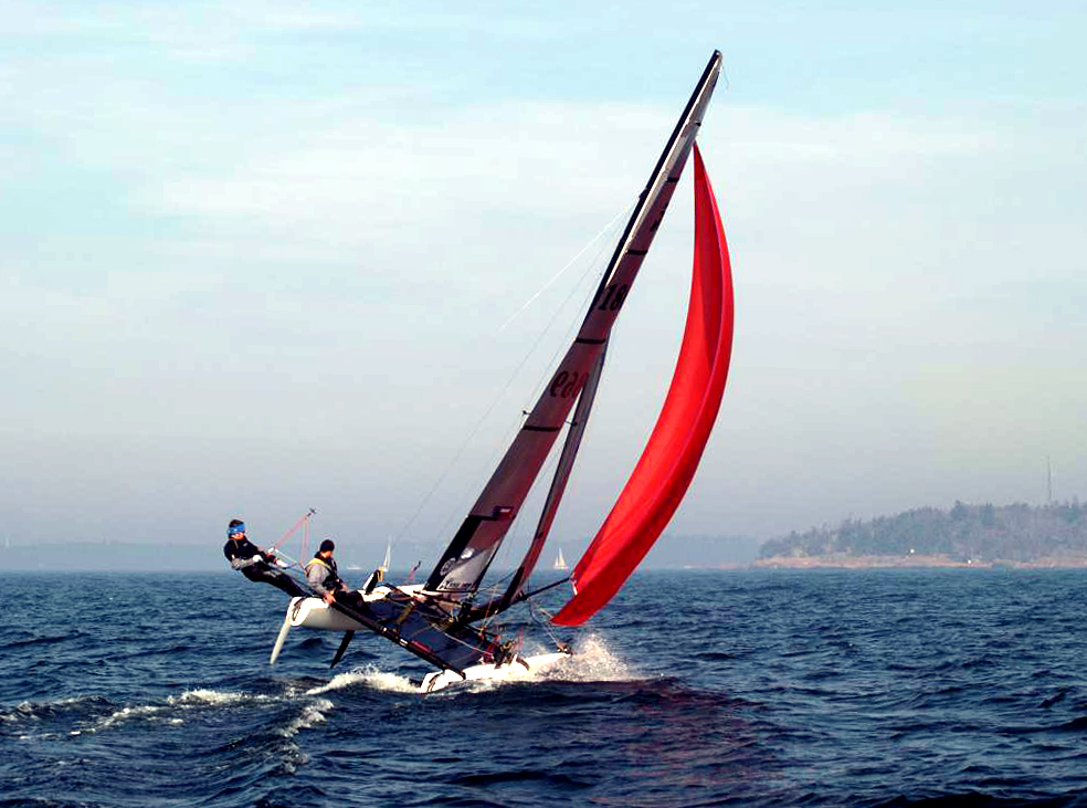 Hobie Cat Tiger, purjehduskilpailu, Suomen Urheiluveneliitto, Helsinki